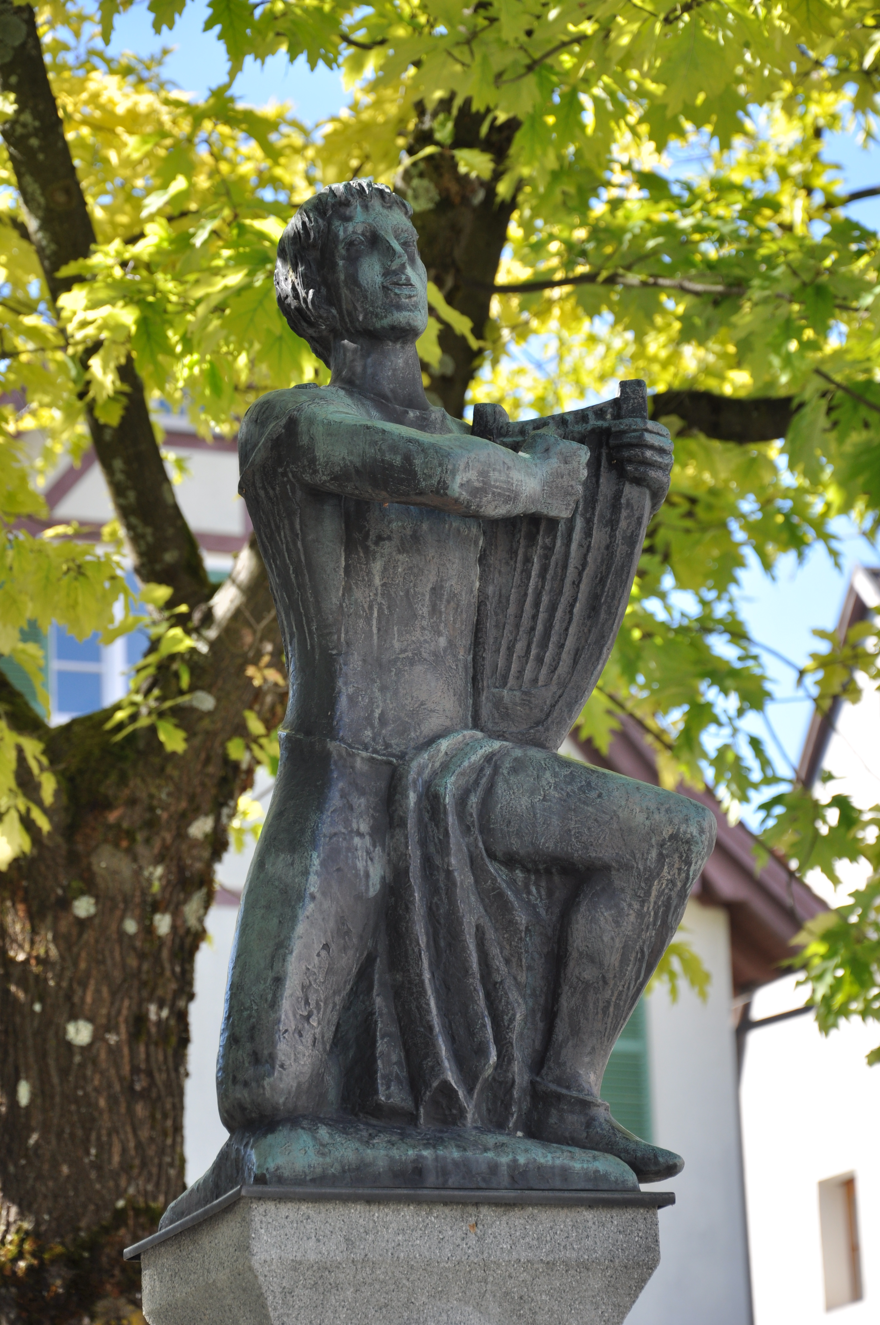 Bregenz, Oberstadt, Hugo-von-Montfort-Brunnen, Detail: Hugo von Montfort